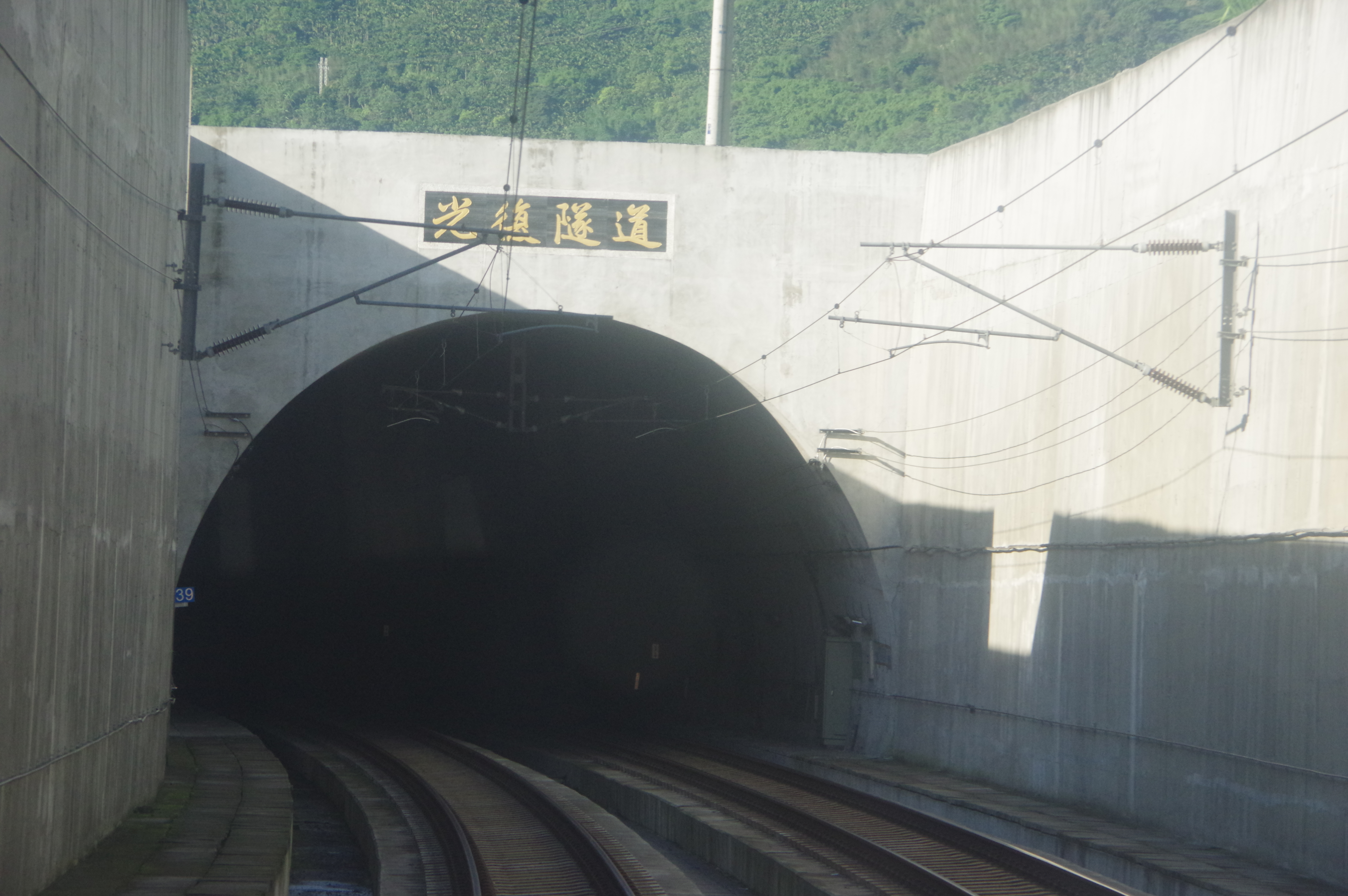 臺灣鐵路管理局第二代光復隧道北口